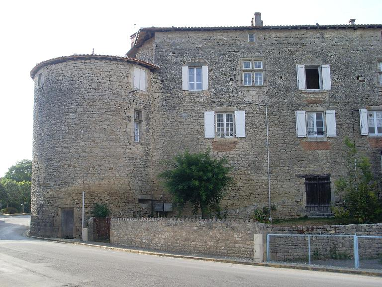 Le chateau du bourg à Champagne-Mouton (16). Construction supposée fin XVème